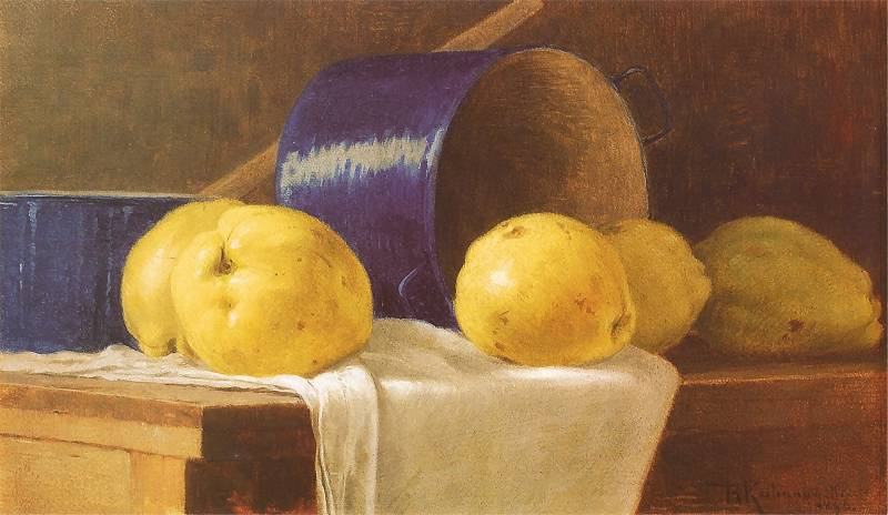 Martwa natura z pigwami